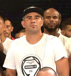 Вёрджил Цвиккер на турнире Плотформа S-70 в 2018 году